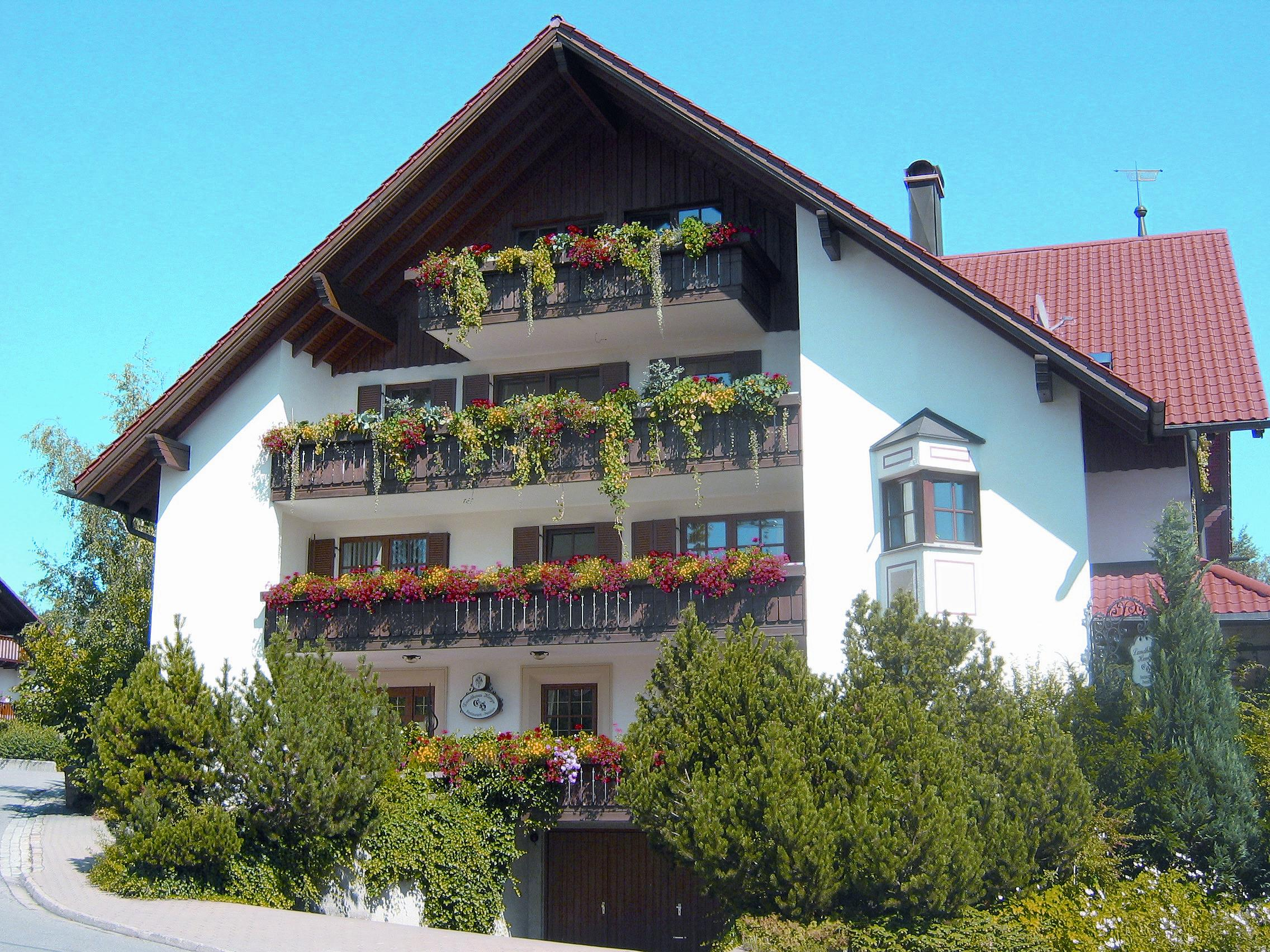 Seitenansicht des ehemaligen Landhaus Henze